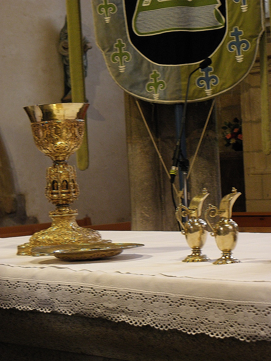 Calice, patène et burettes classés. Détail du trésor de Saint-Jean-du-Doigt (29) exposé lors du grand pardon du 24 juin 2012.